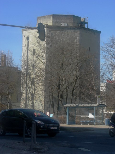 München: Alter Hochbunker am Anhalter Platz